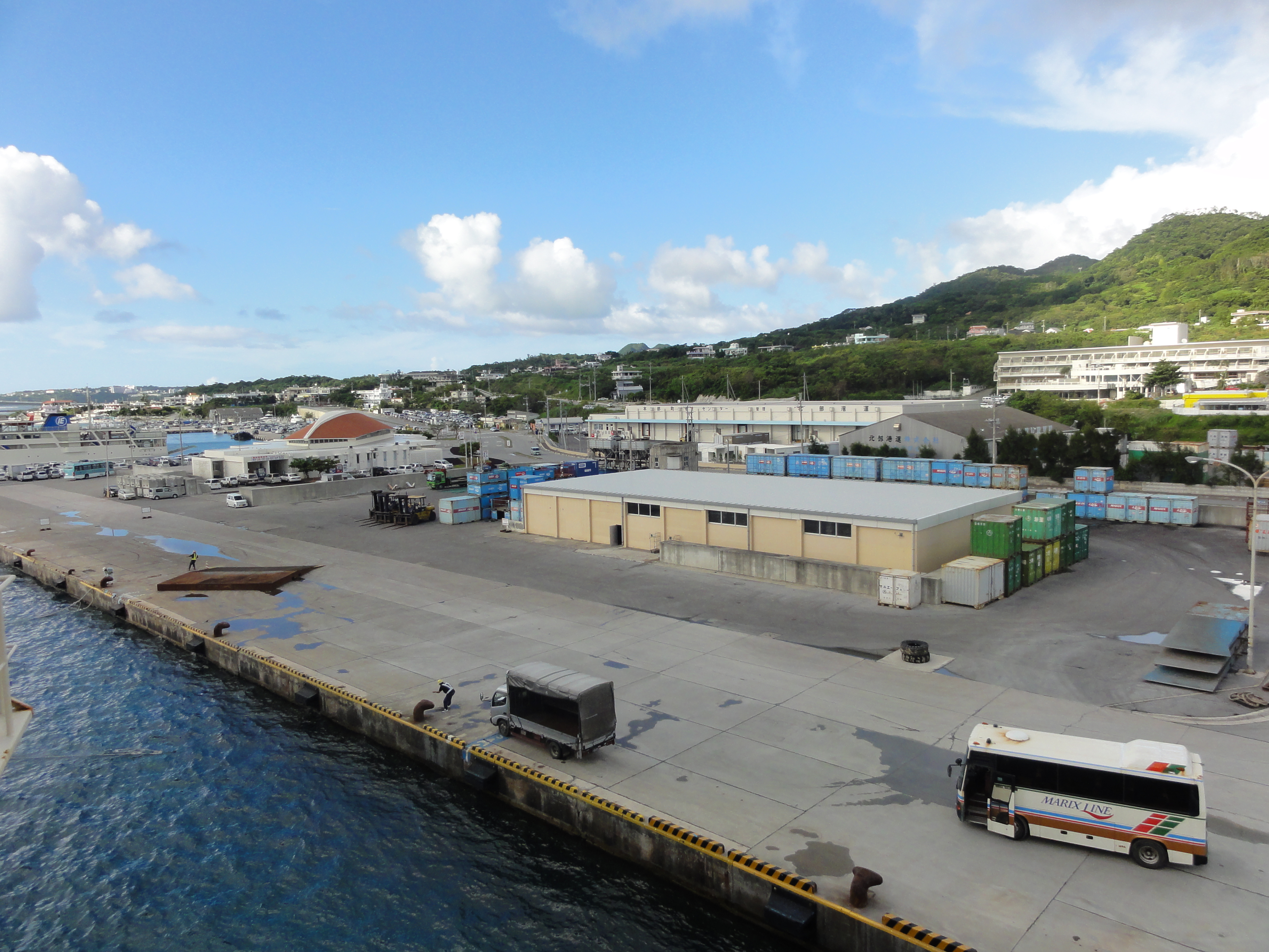 本部港